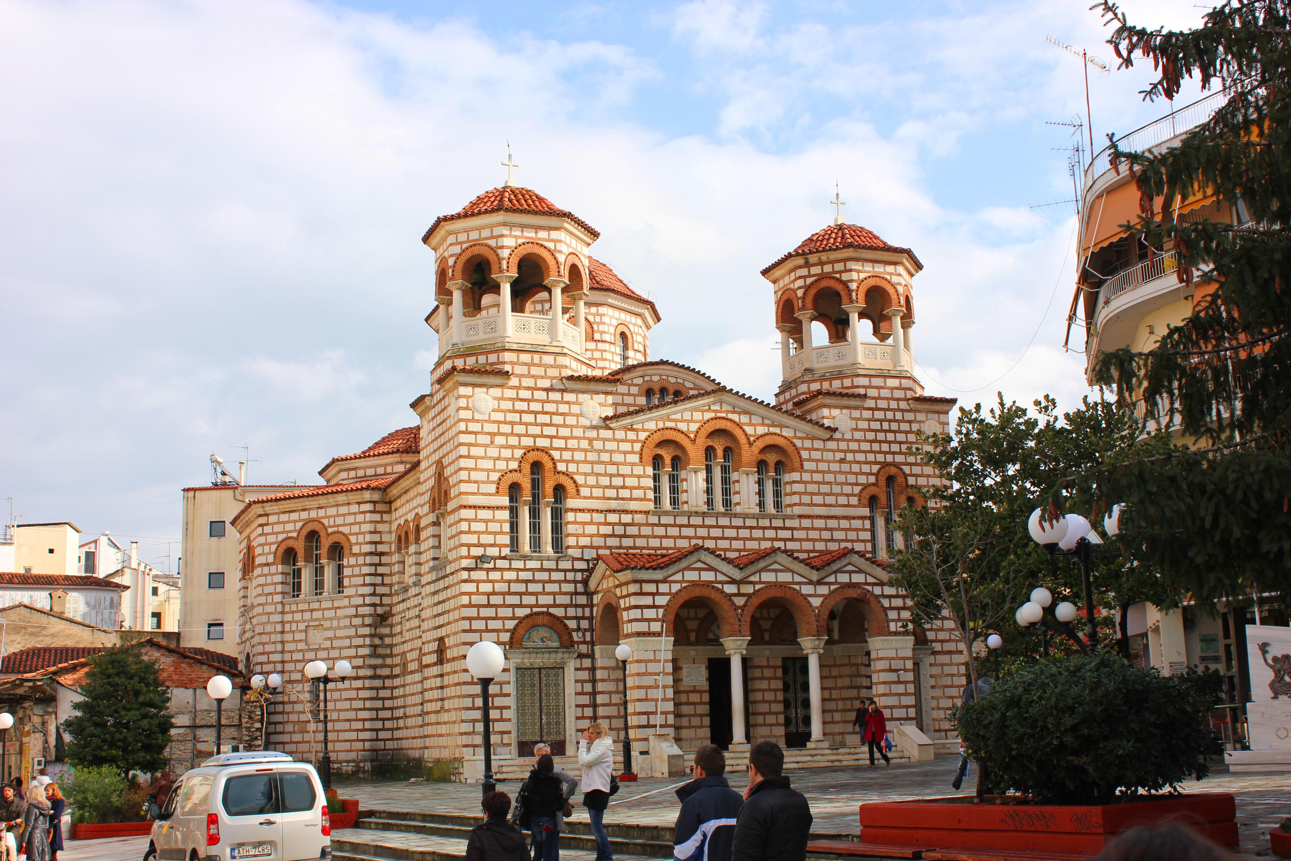 Ναός Αγίου Δημητρίου Αρτας